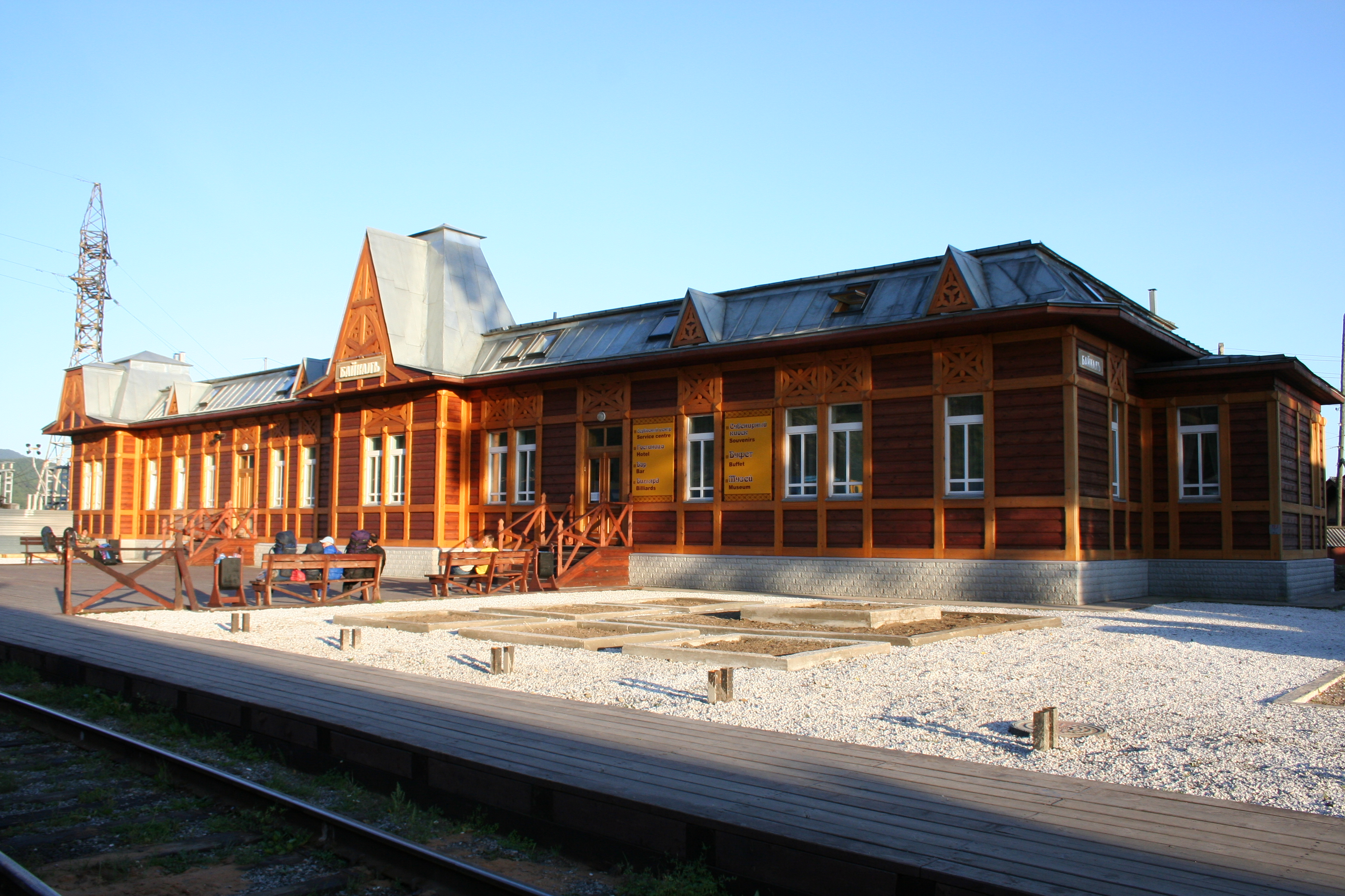 stanice Bajkal